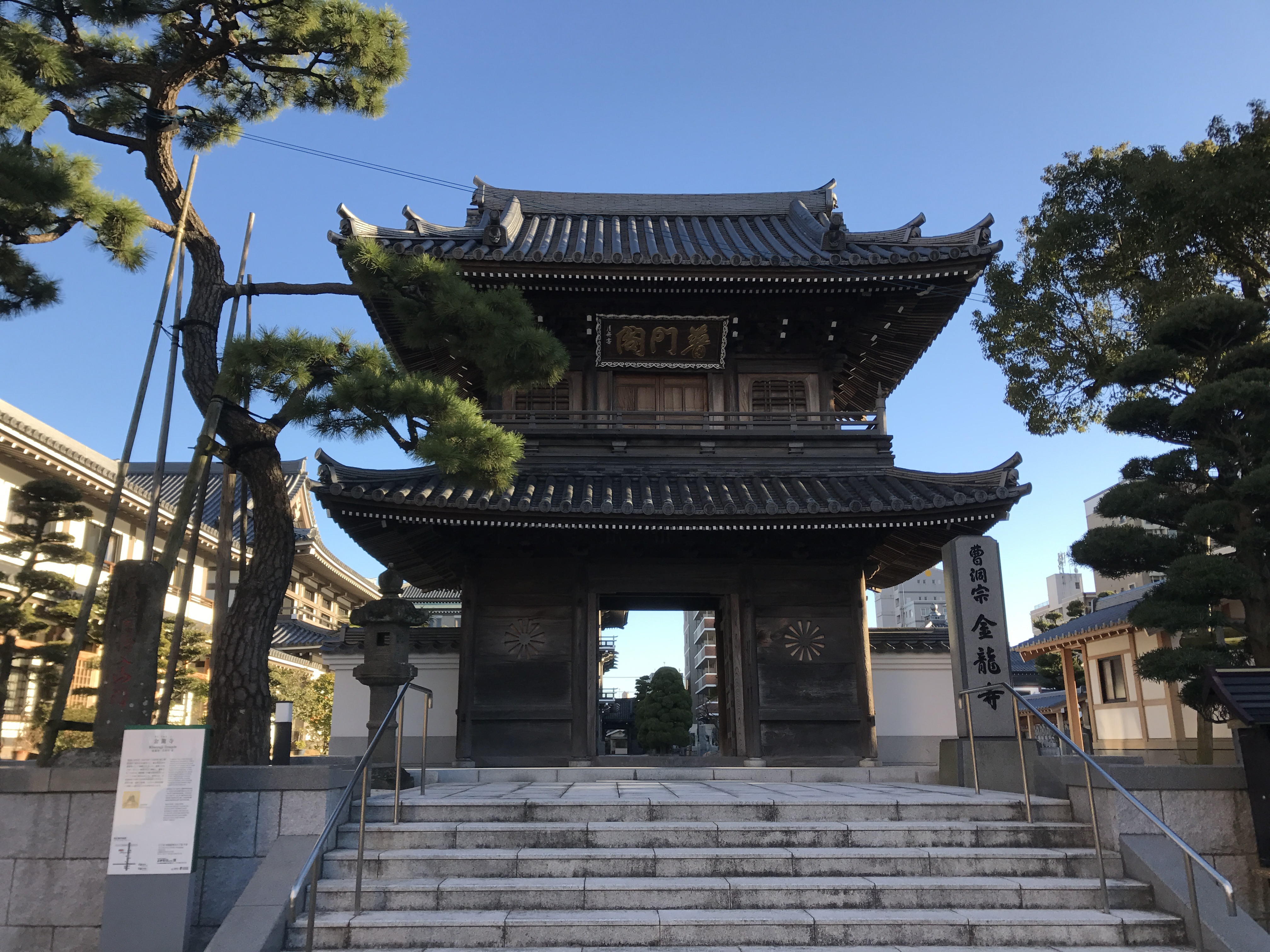 福岡市中央区・金龍寺の仁王門